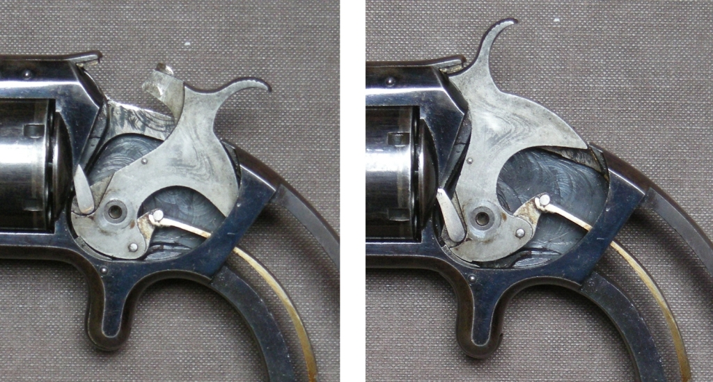 S & W Model 2 Funktion